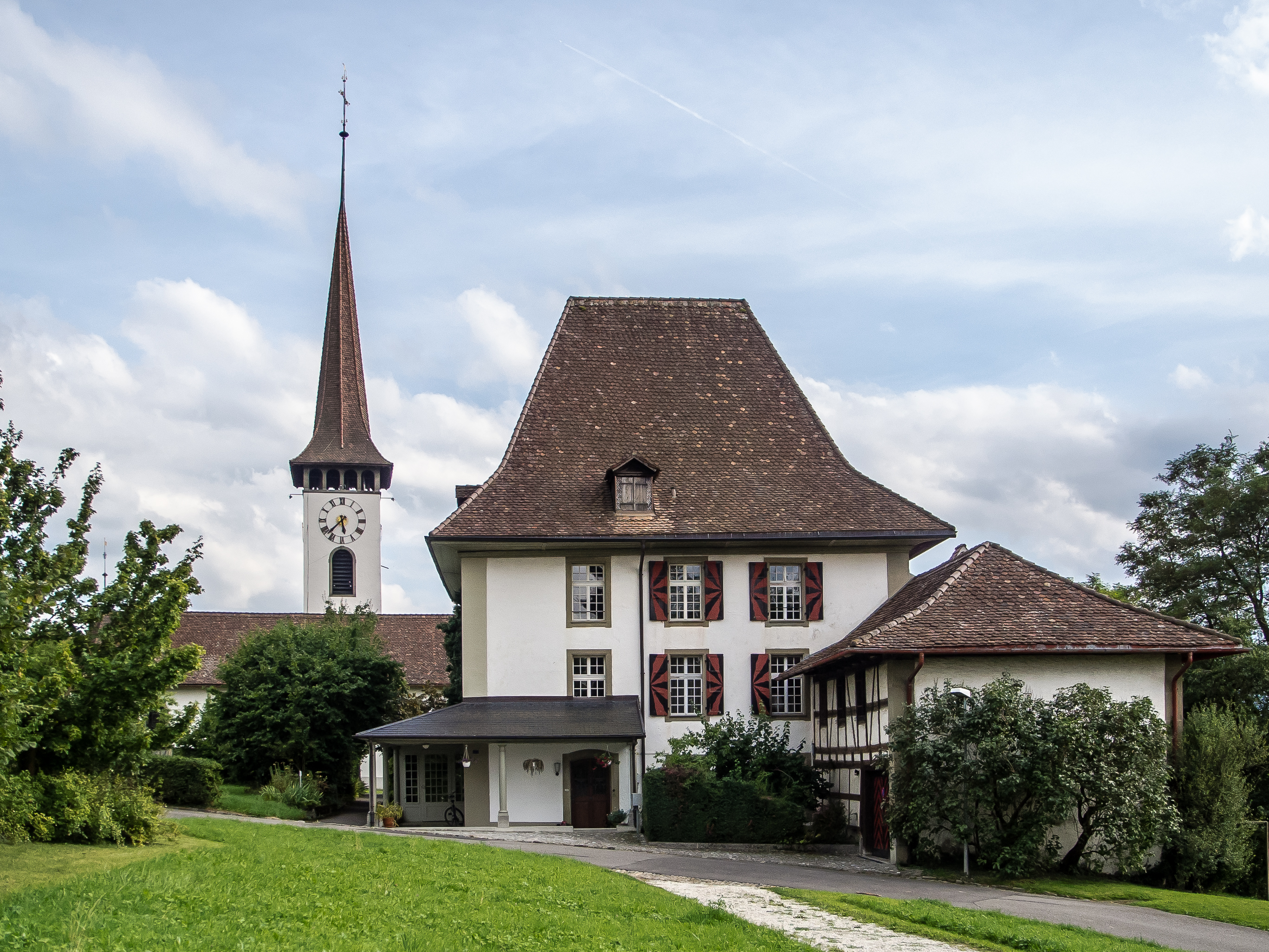 Pfarrhaus mit Kirche, von der Eingangsseite her